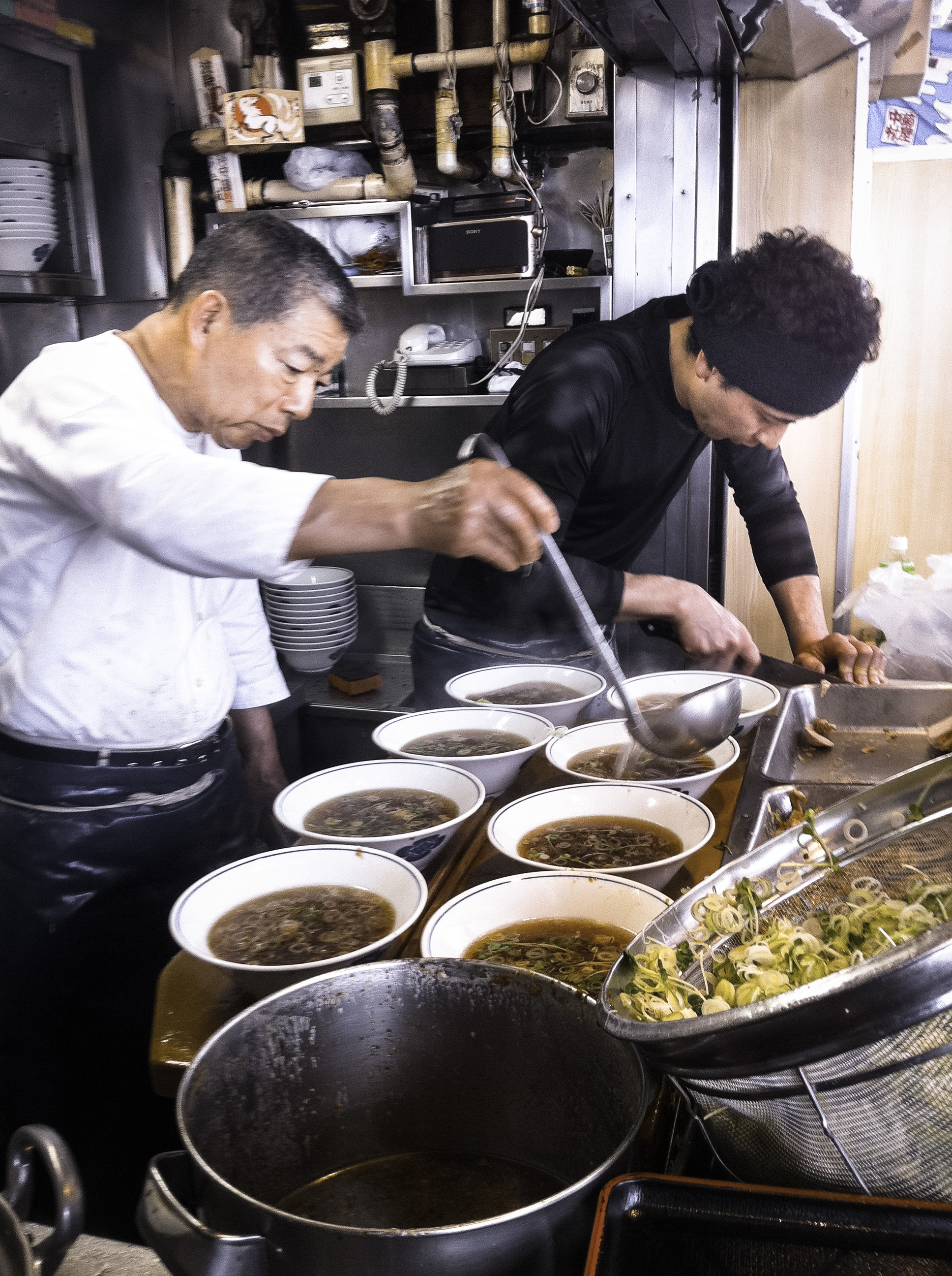 Tachi-gúi ramen